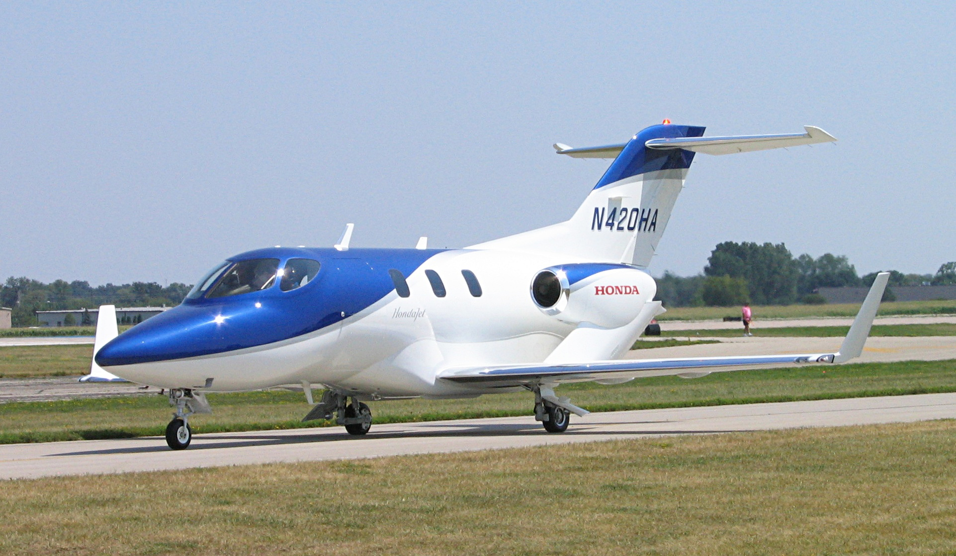 HondaJet, Good Design Award 2007.